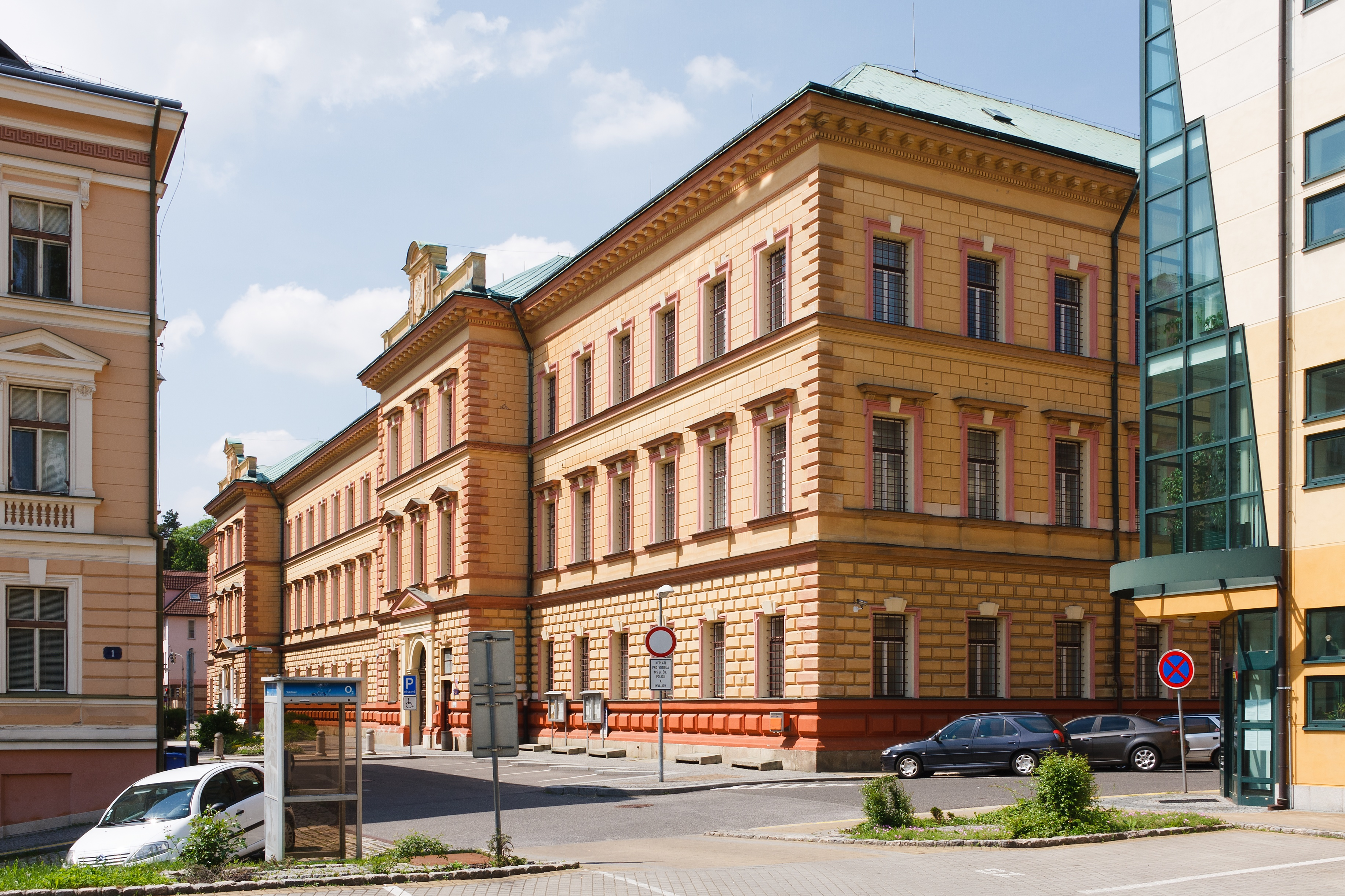 Budova vazební věznice Liberec, východní pohled